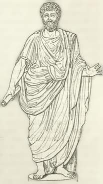 römische Toga